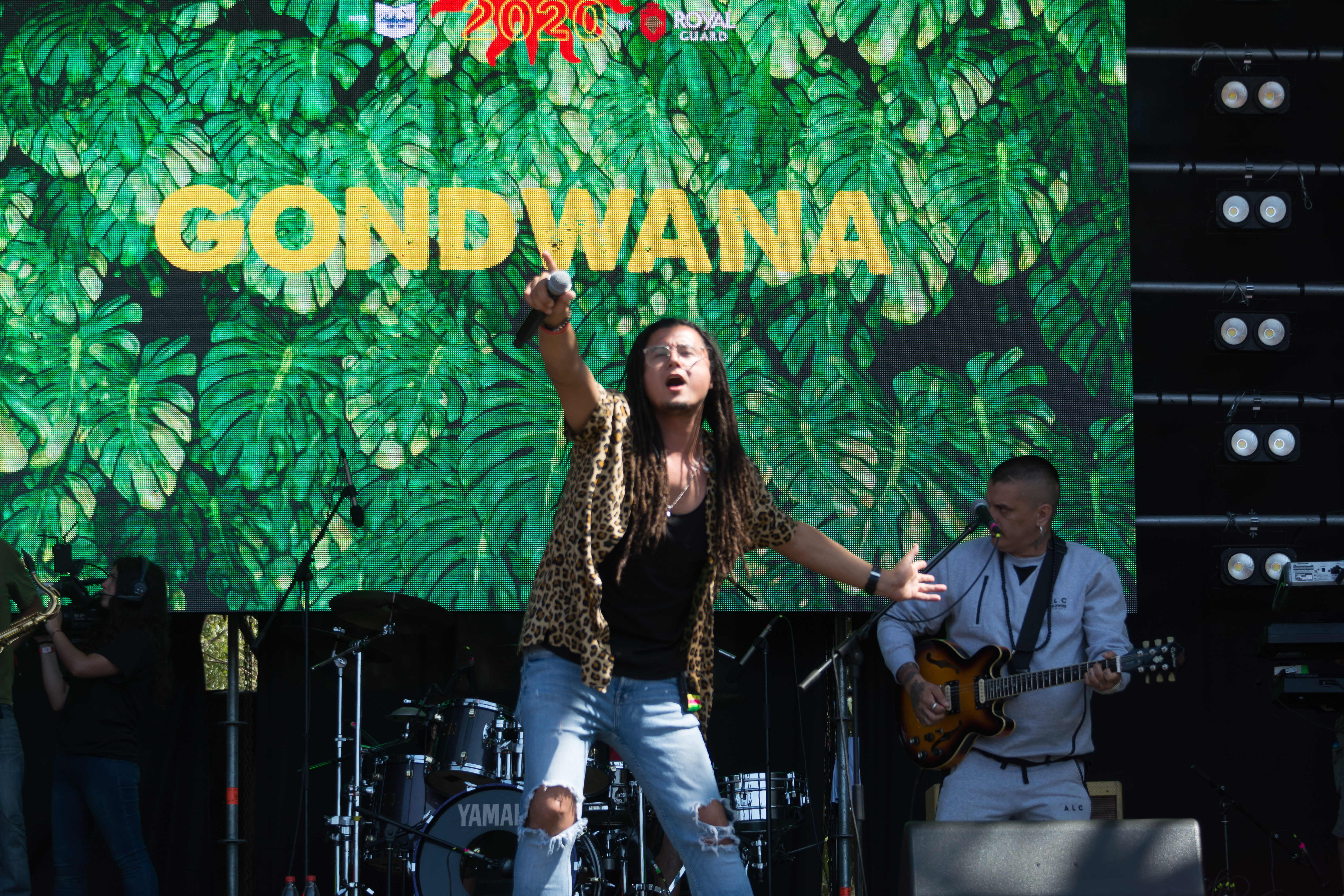 Pichilemu Surfestival 2020, Camping Laguna El Perro, Pichilemu, Región de O'Higgins, Chile